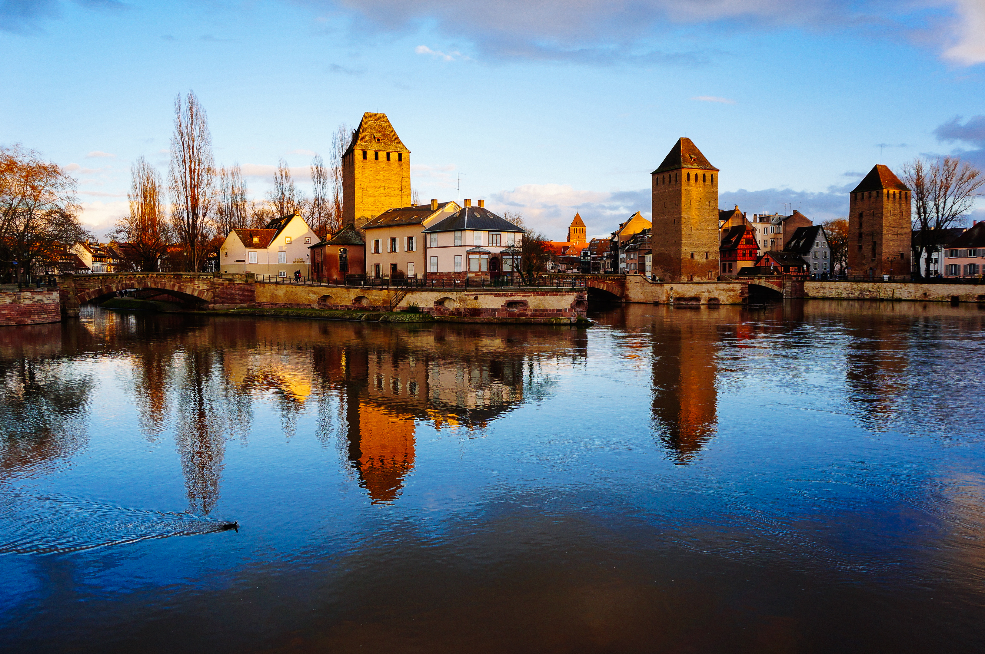 Ponts couverts, Strasbourg, France En hiver .